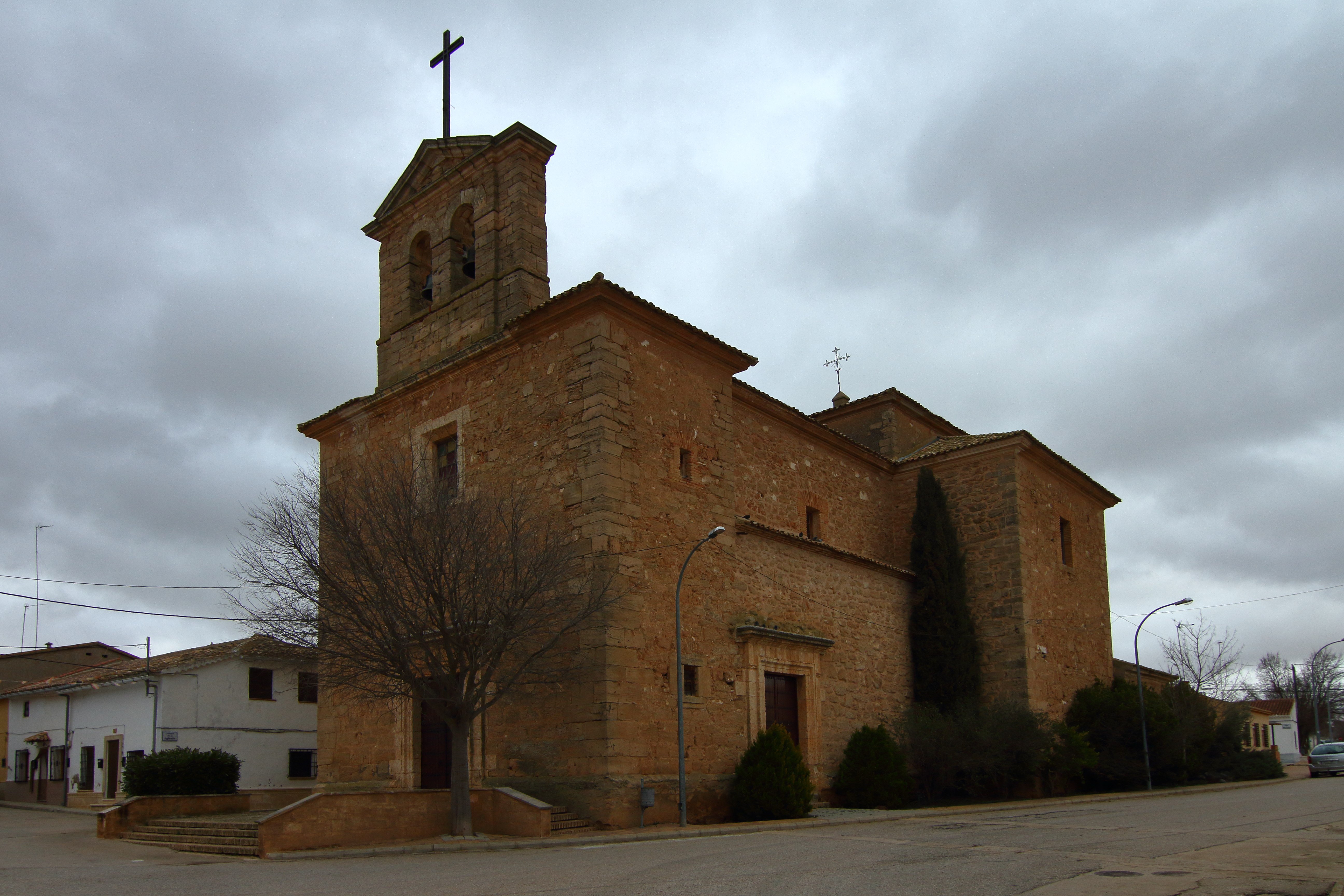 Rubielos Bajos, Iglesia parroquial, 02